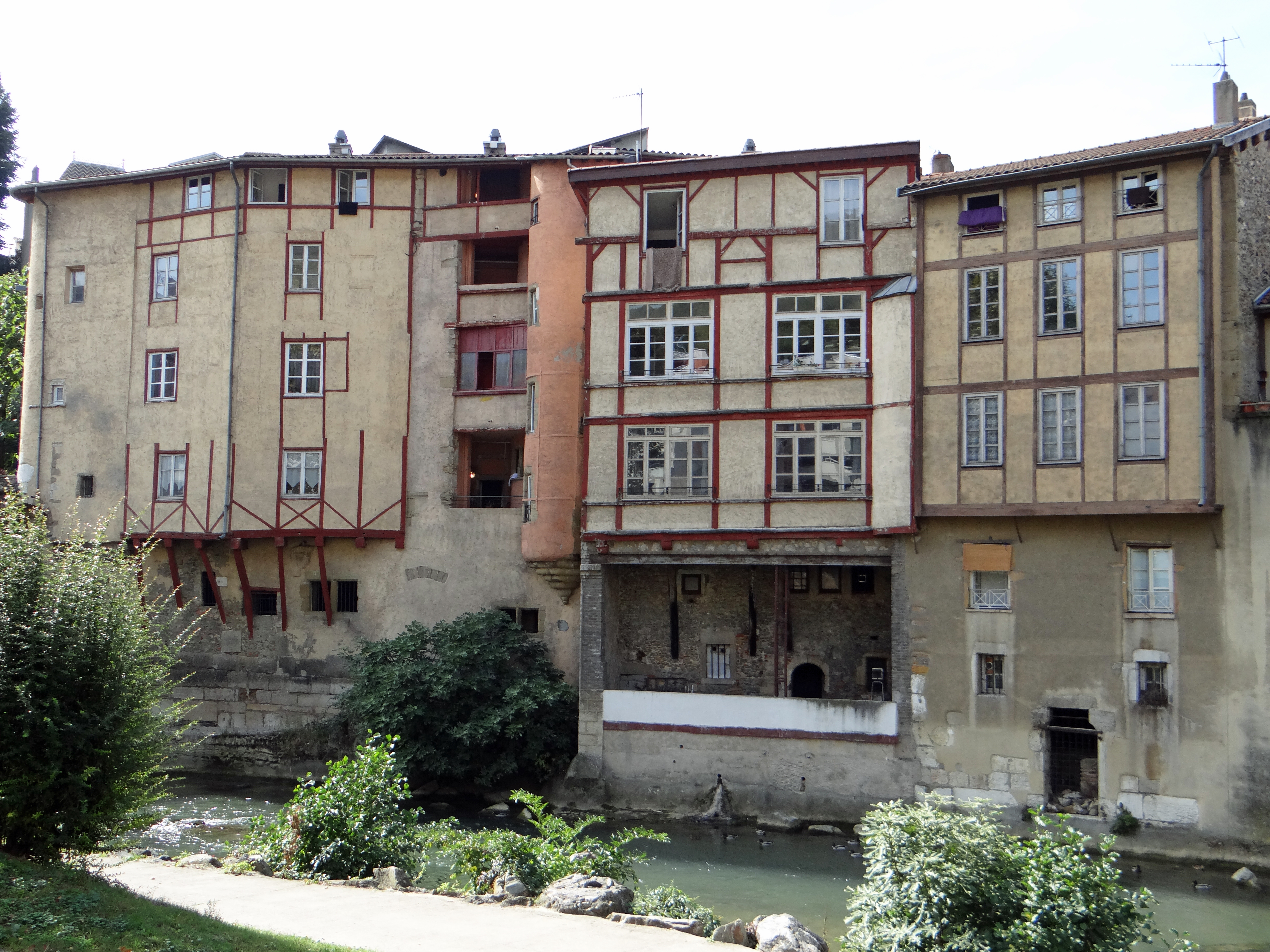 Vienne (Isère) - Les rives de la Gère : Rive gauche, à l'aval du pont Saint-Martin